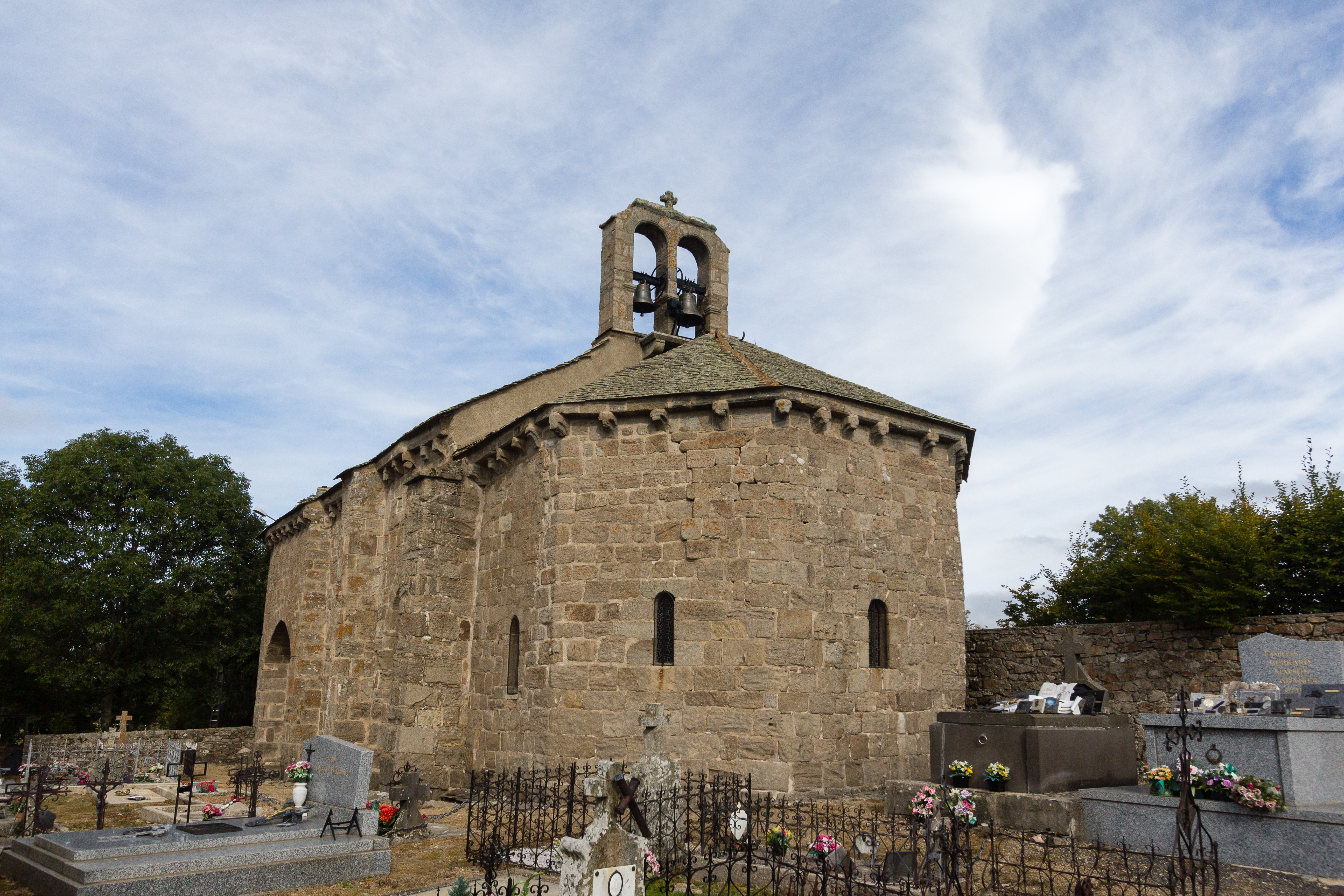 Église Saint-Frézal de Saint-Frézal-d'Albuges (France).